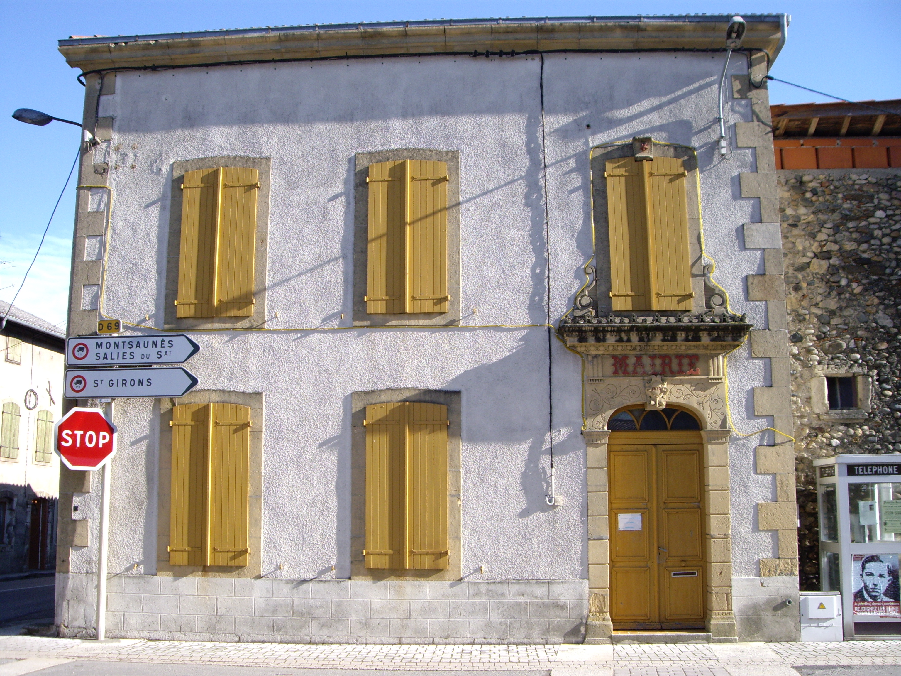 Mairie de Lestelle-de-Saint-Martory (31)